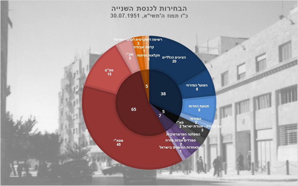 תוצאות הבחירות לכנסת השנייה